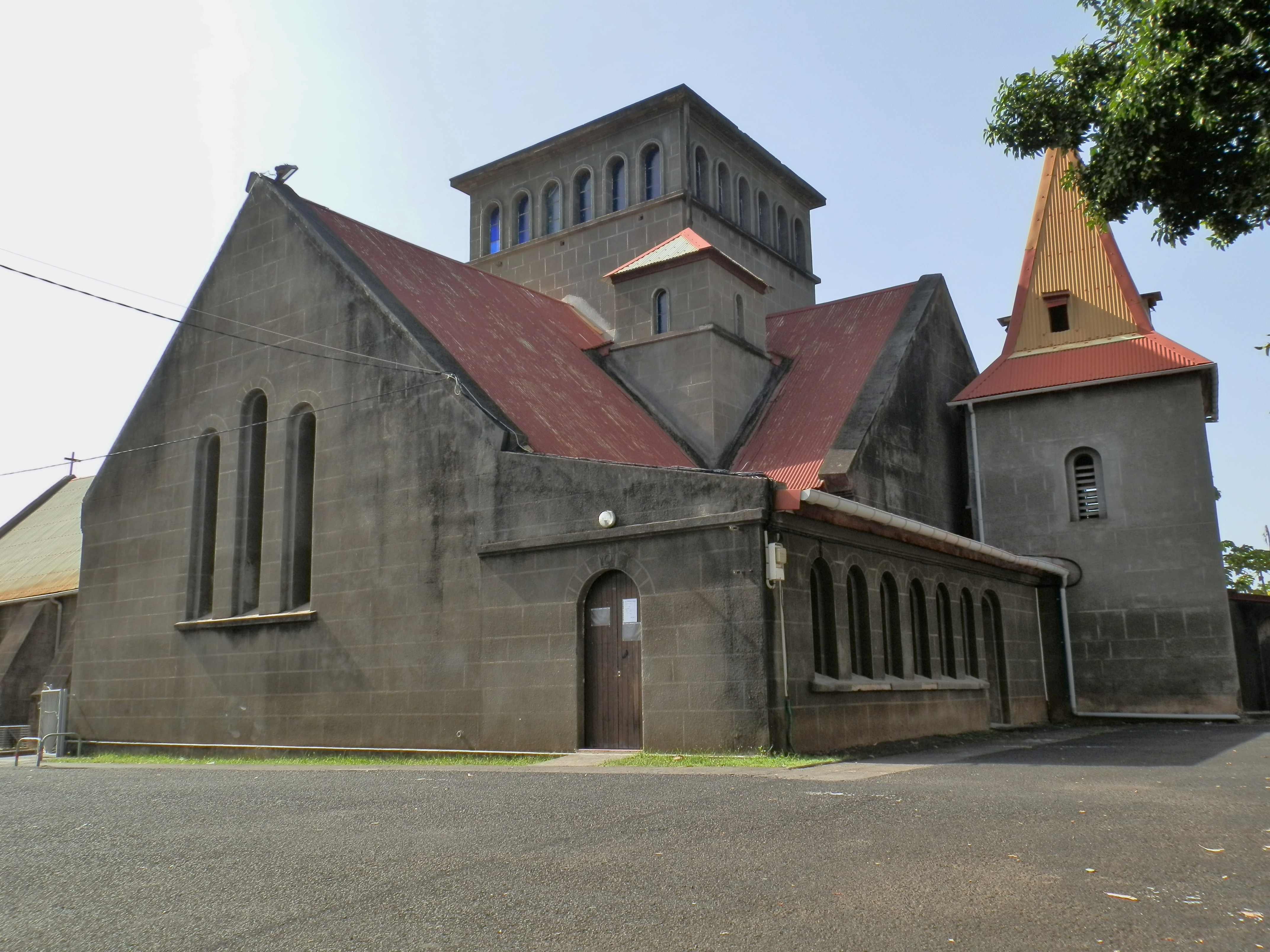 Église Saint-Joseph de Vieux-Habitants, (Classé, 2006) This building is en partie classé, en partie inscrit au titre des Monuments Historiques. .